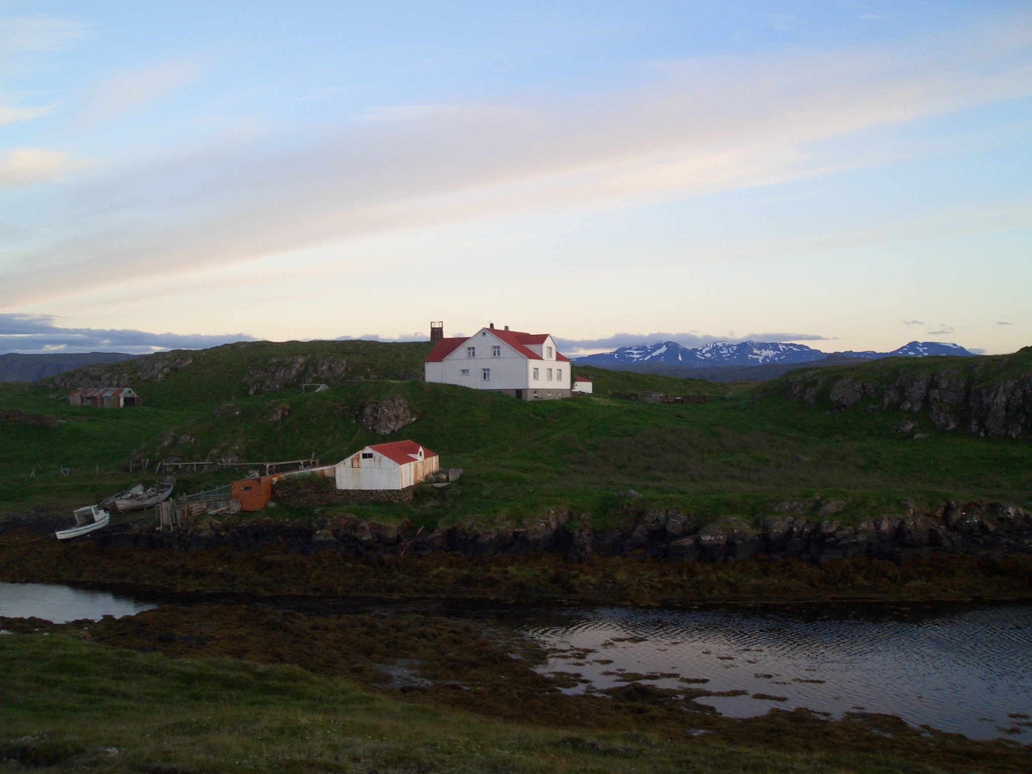 Mynd tók Símon B Hjaltalín í ágúst 2006. Hann hefur gefið leyfi á því að nota hana, myndin er ekki varin höfundarétti. Hún finnst ekki á netinu, og er þetta fyrsta sinn sem hún er birt. Kári B Hjaltalín